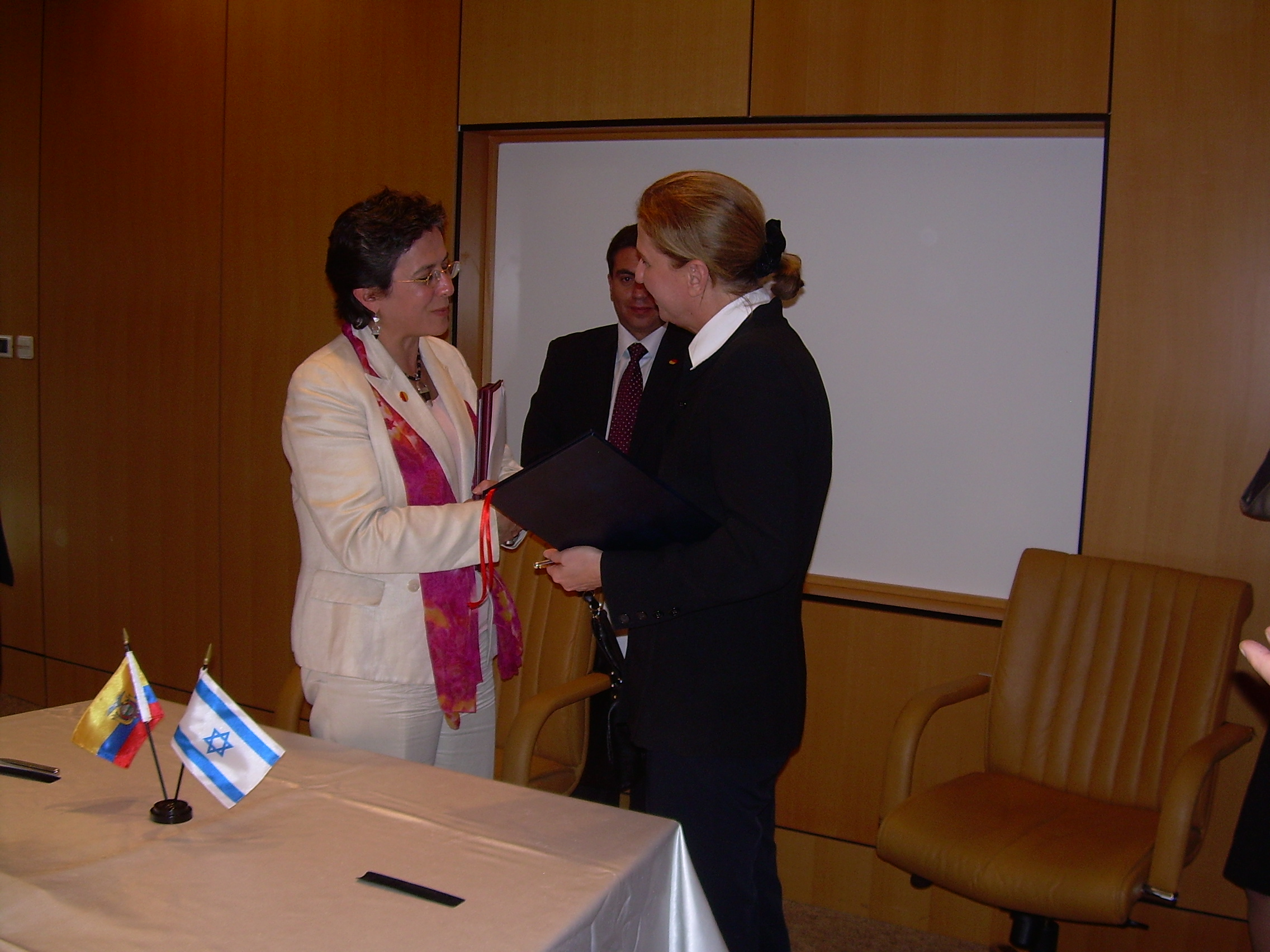 Durante su visita oficial a Israel, la Ministra de Relaciones Exteriores, Comercio e Integración, María Isabel Salvador y su homóloga Israelí Tzipi Livni, suscribieron un Memorando de Entendimiento sobre el Establecimiento de Consultas Bilaterales entre las Cancillerías de ambos países. Dicho instrumento busca profundizar y desarrollar las relaciones entre Ecuador e Israel e intercambiar opiniones sobre asuntos binacionales, regionales e internacionales de interés mutuo.